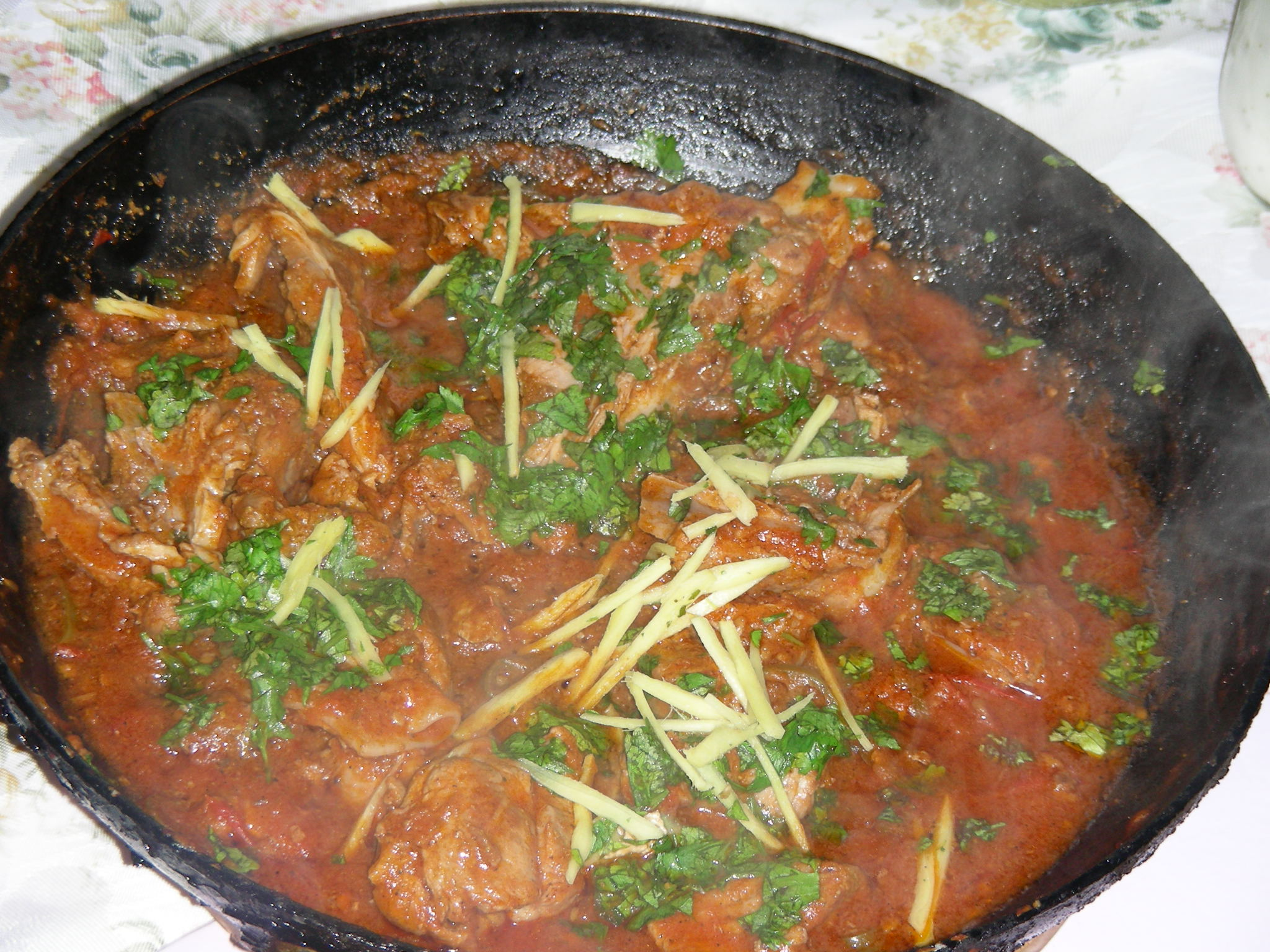 Balti gosht